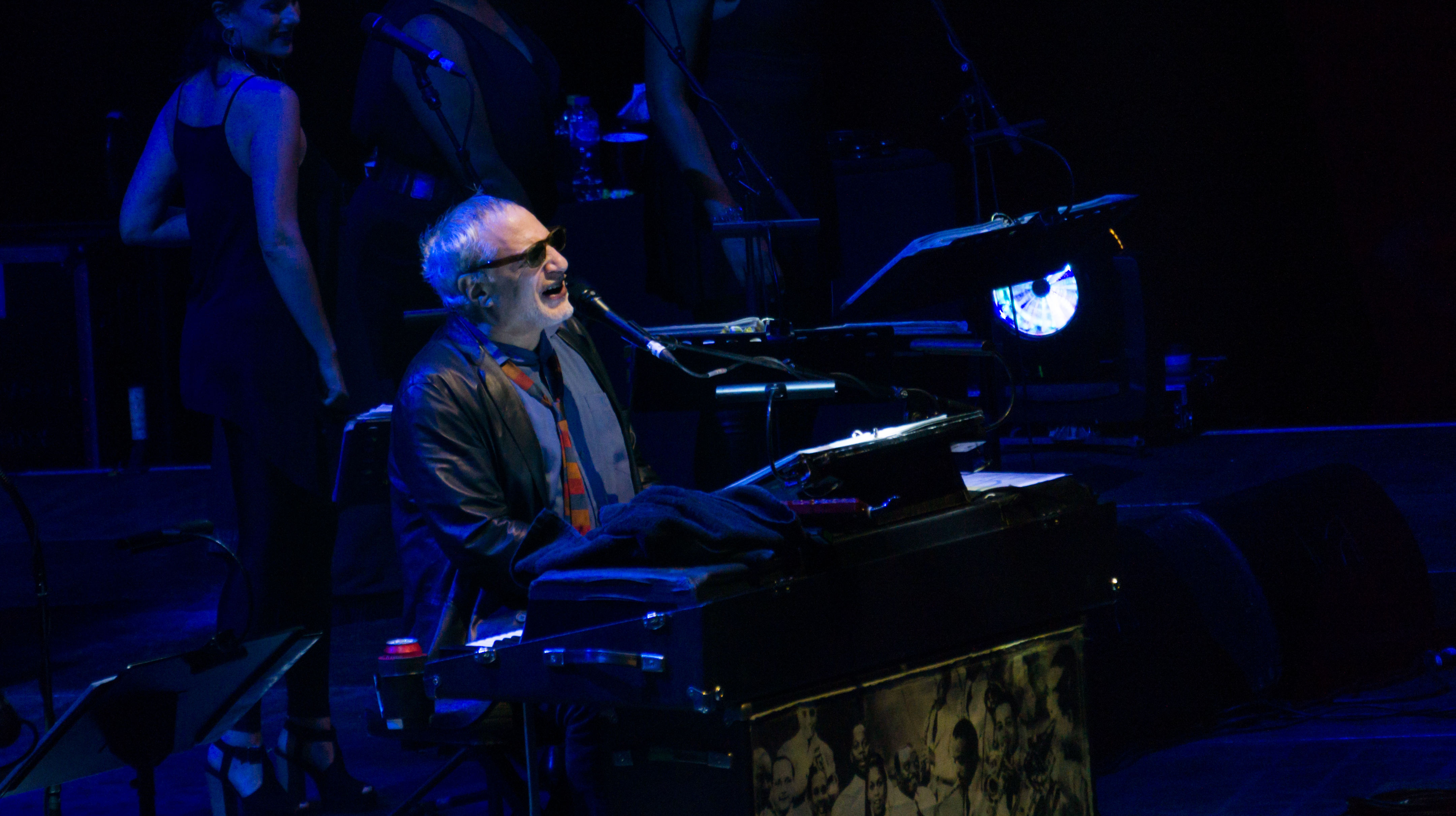 SteelyDanO2291017-22